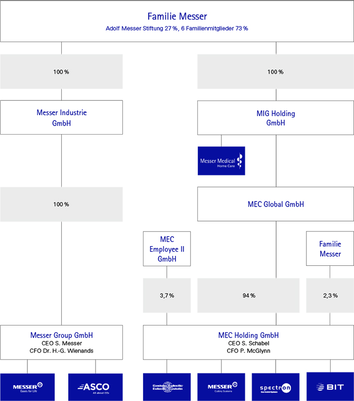 Struktur der Messer Cutting Systems GmbH